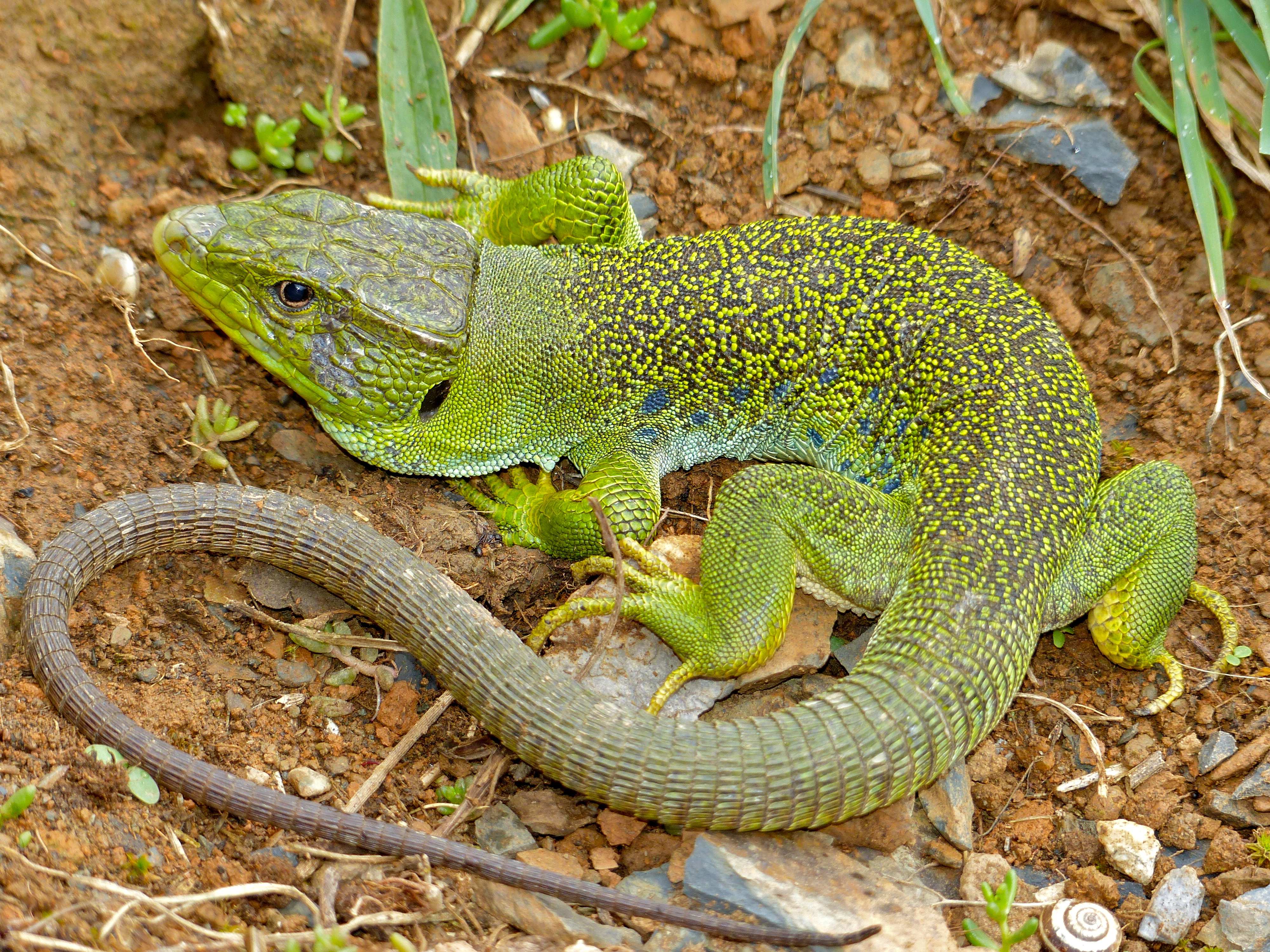 Dobres, La Vega de Liébana, Cantabria, SPAIN